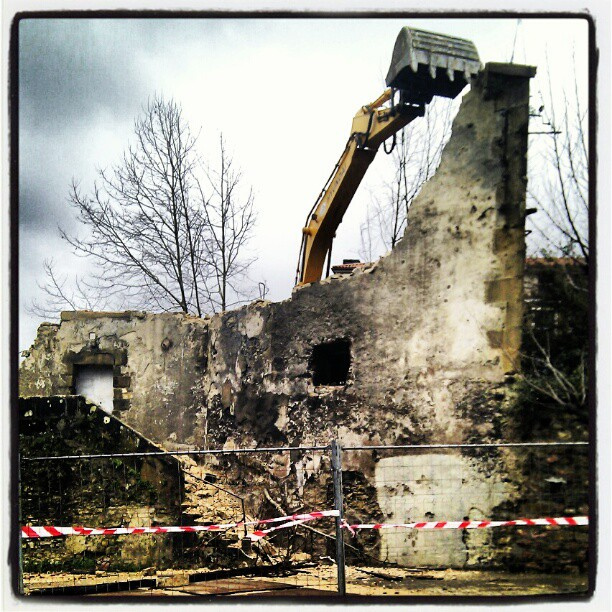 Munto baserria eraisten.